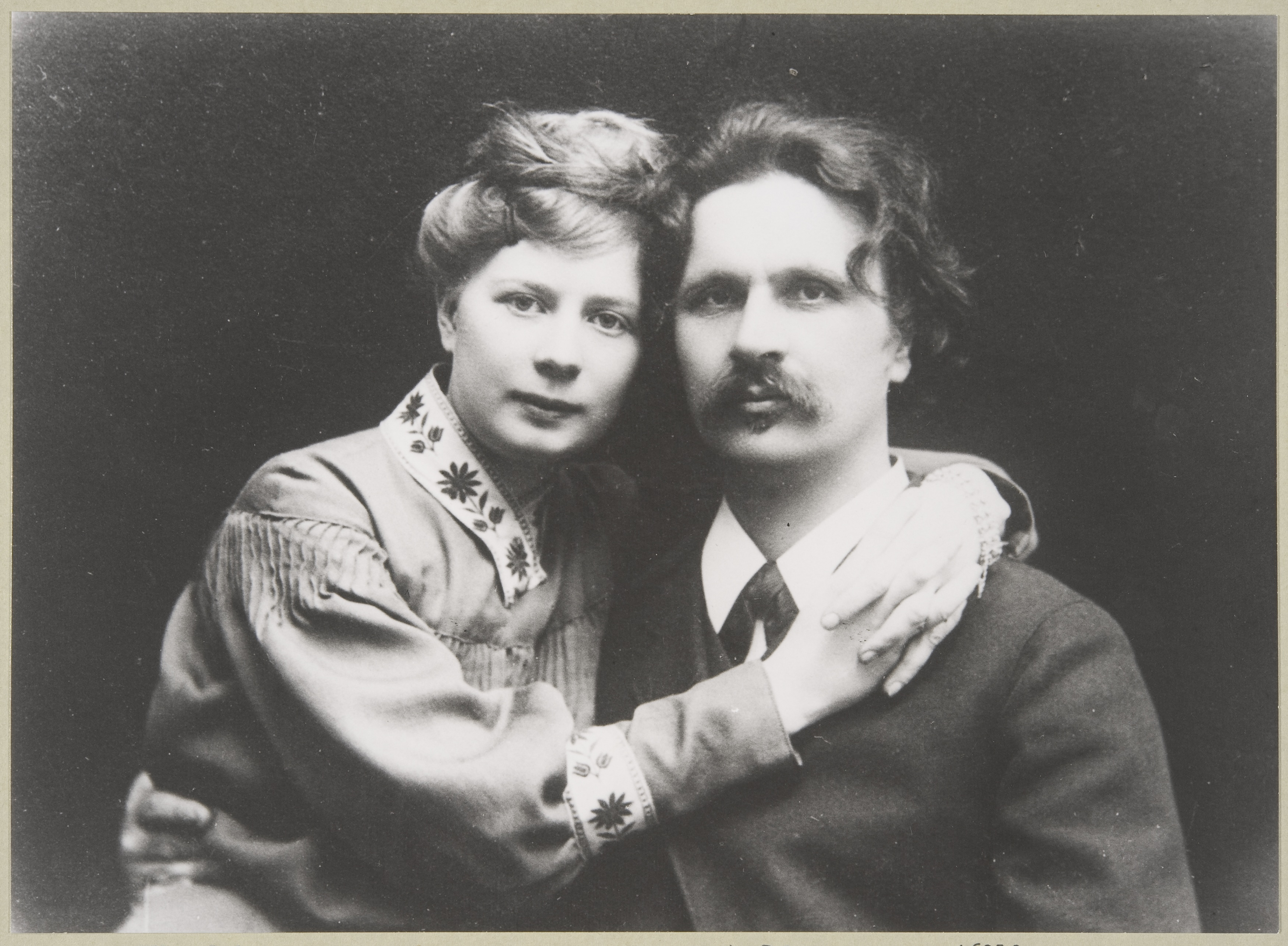 Utopistisosialisti Matti Kurikka toisen puolisonsa Hanna Räihän kanssa 1900-luvun alussa.